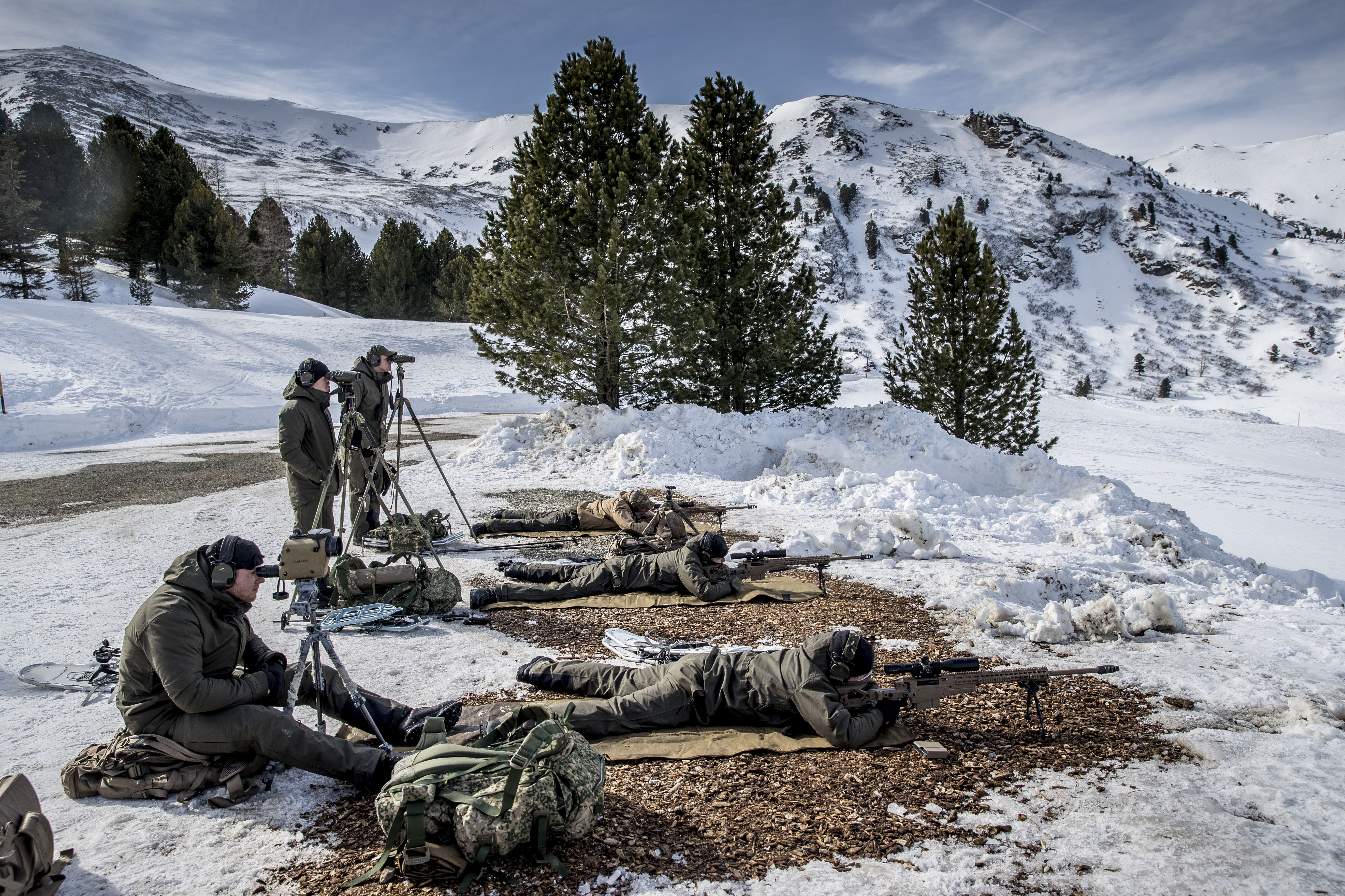 Judenburg, Oostenrijk 20 Februari 2019 High Angle shoot training Scherpschutter oefenen in berg gebied